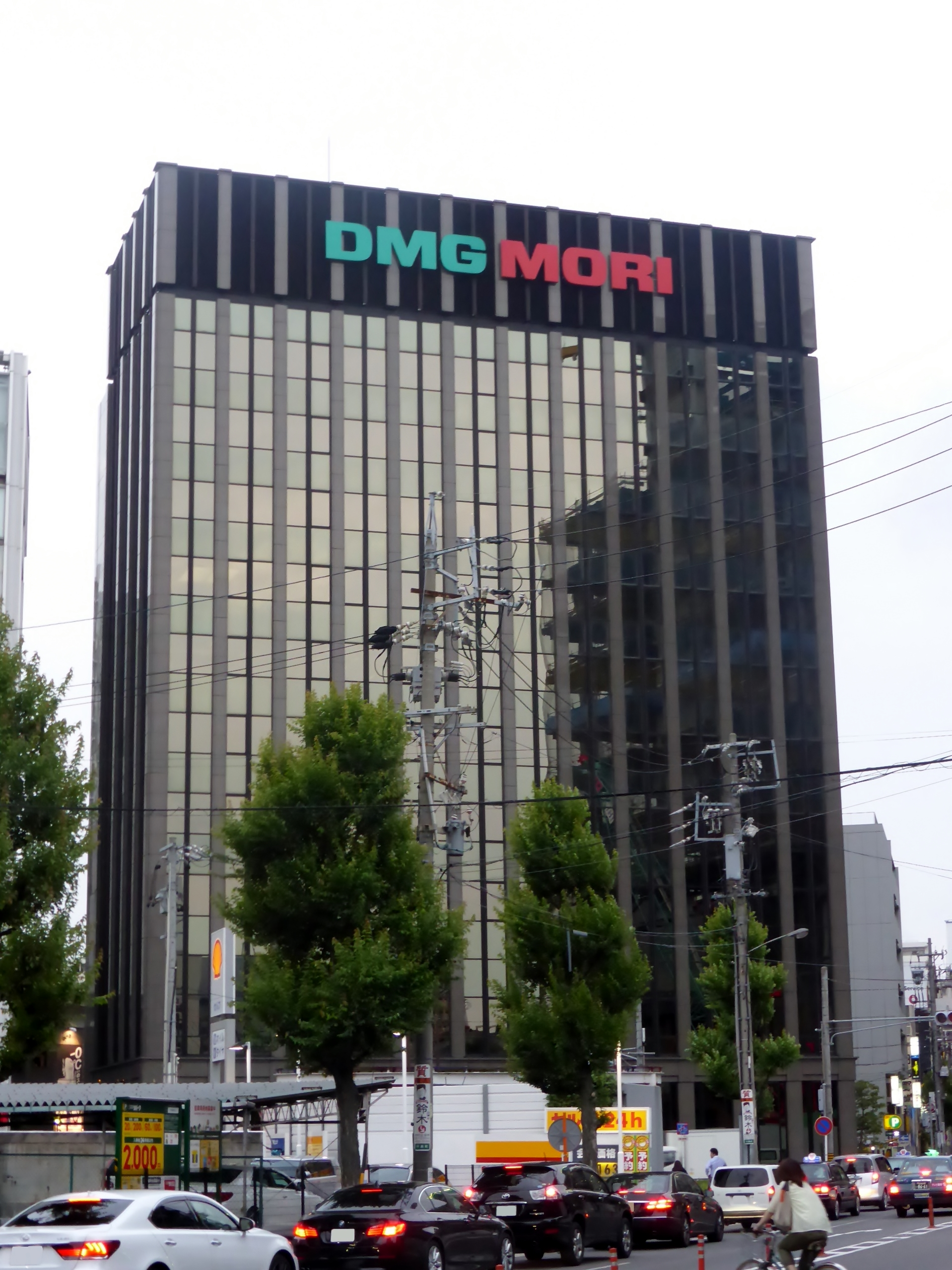 DMG森精機株式会社本社を撮影。